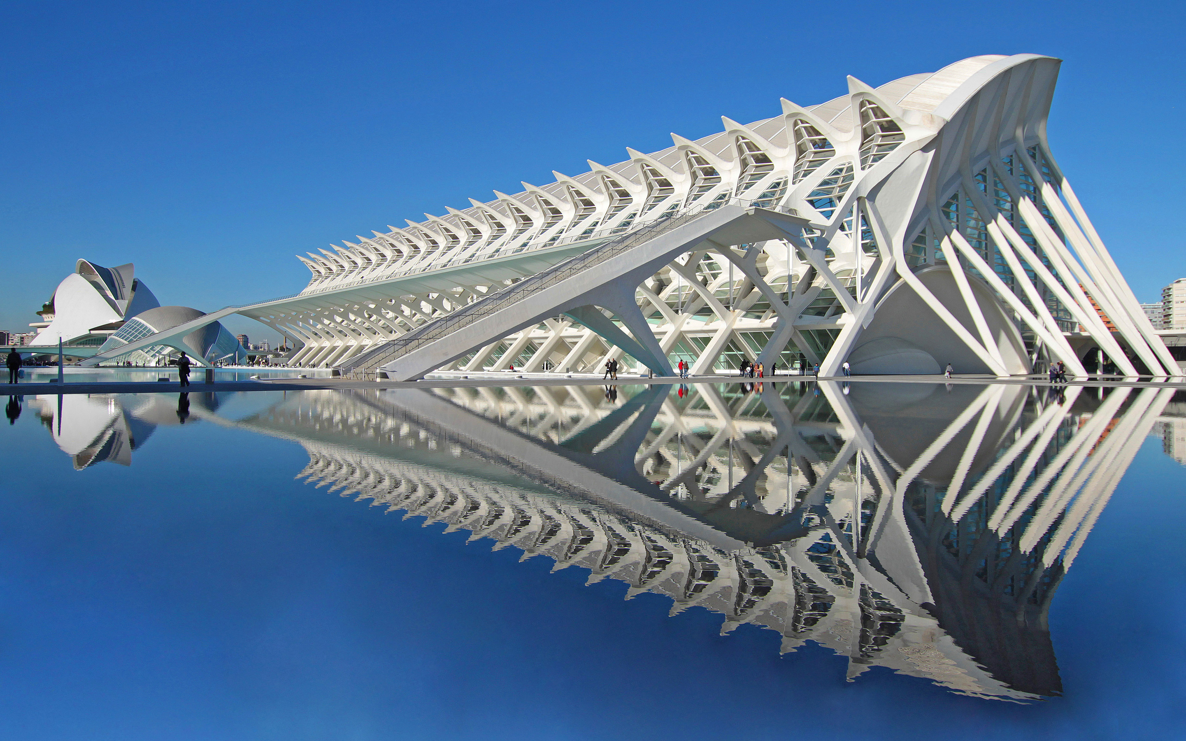 Bilim ve Uzay Müzesi Valensiya